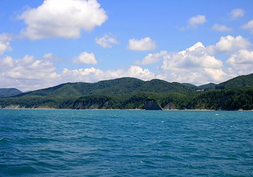 Туапсе